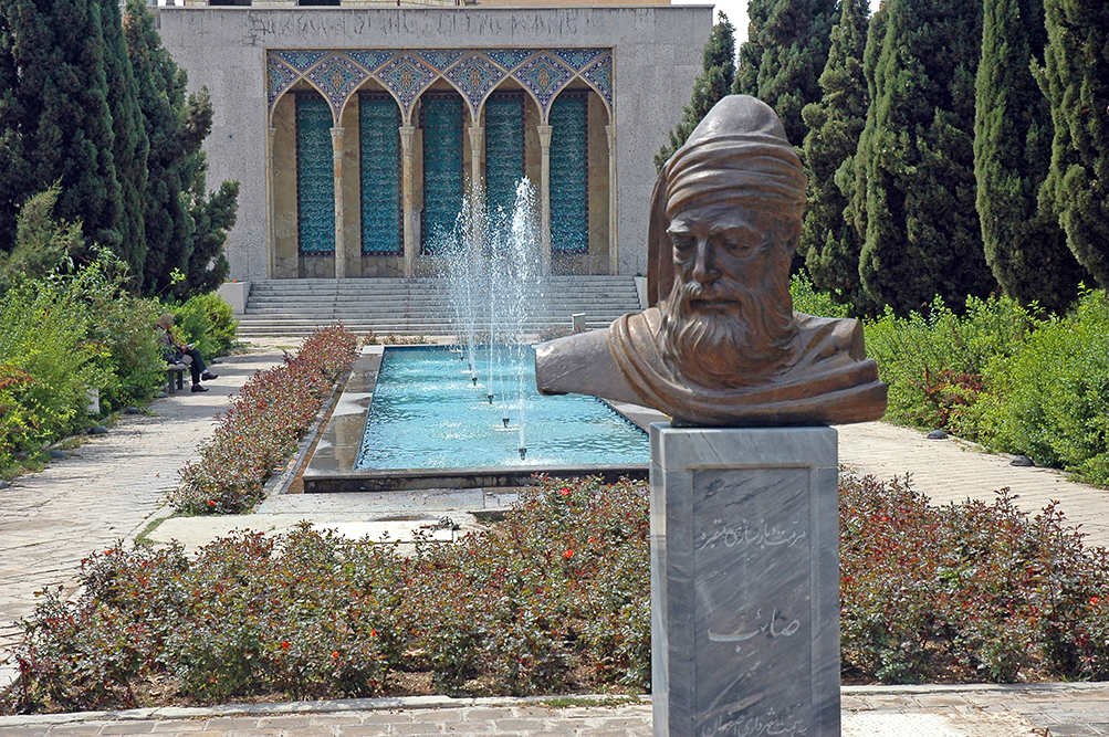 آرامگاه صائب